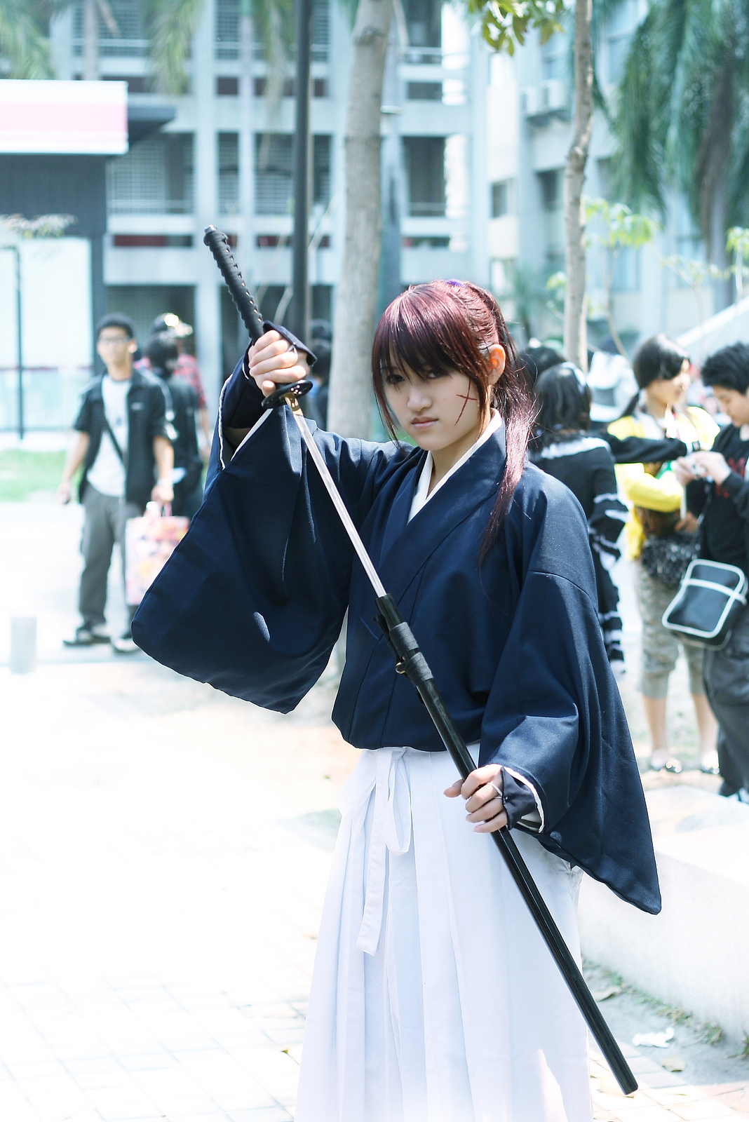 第9屆WS學園祭，《神劍闖江湖》緋村劍心cosplayer。